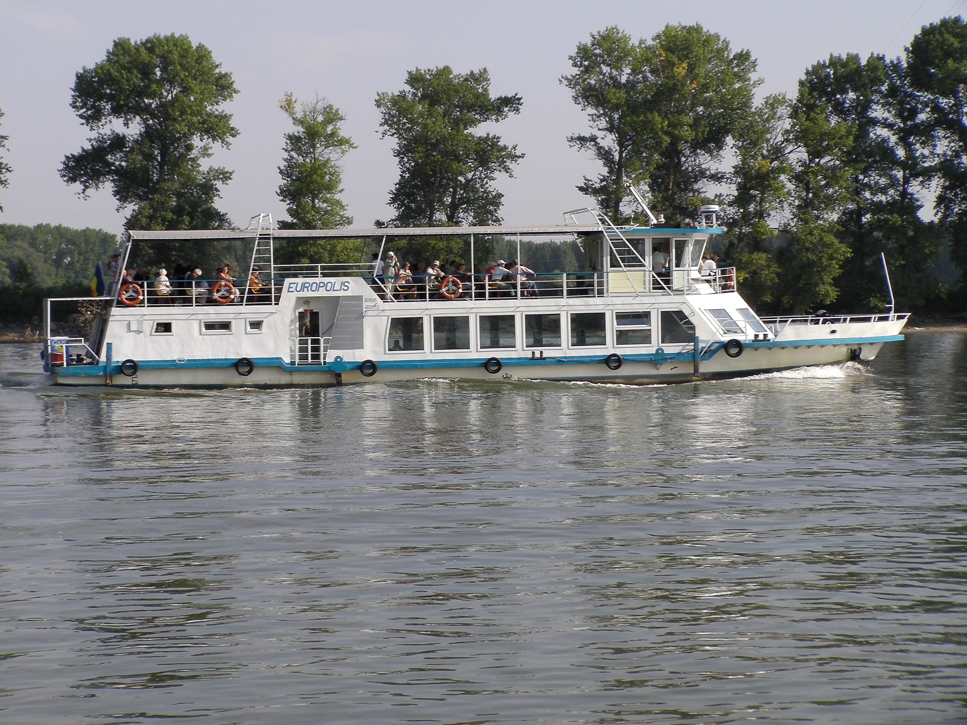 A cruise boat in Danube Delta